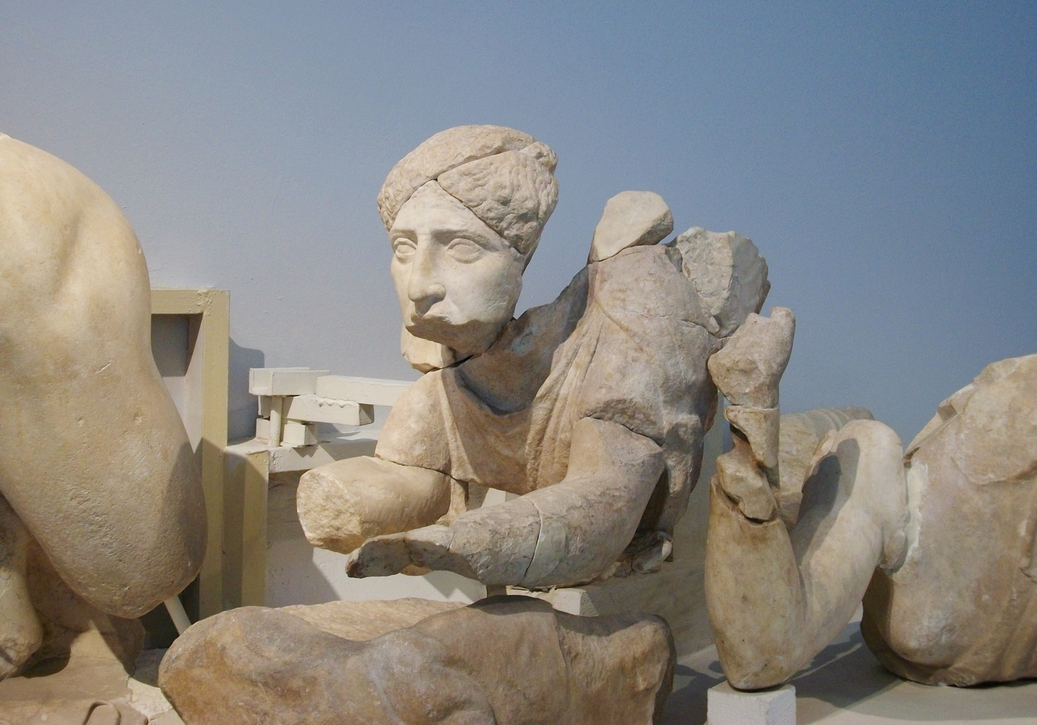 Dona làpita, frontó occidental del temple de Zeus, Olímpia, museu arqueològic.